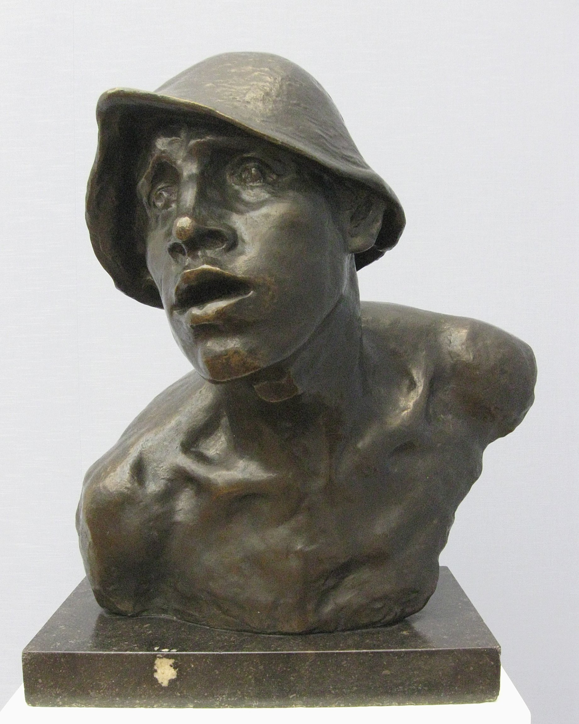 Constantin Meunier, Der Hüttenarbeiter, um 1890, Neue Pinakothek, München